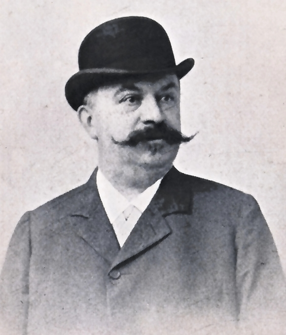 Emil Schimpke (1846 - 1909)